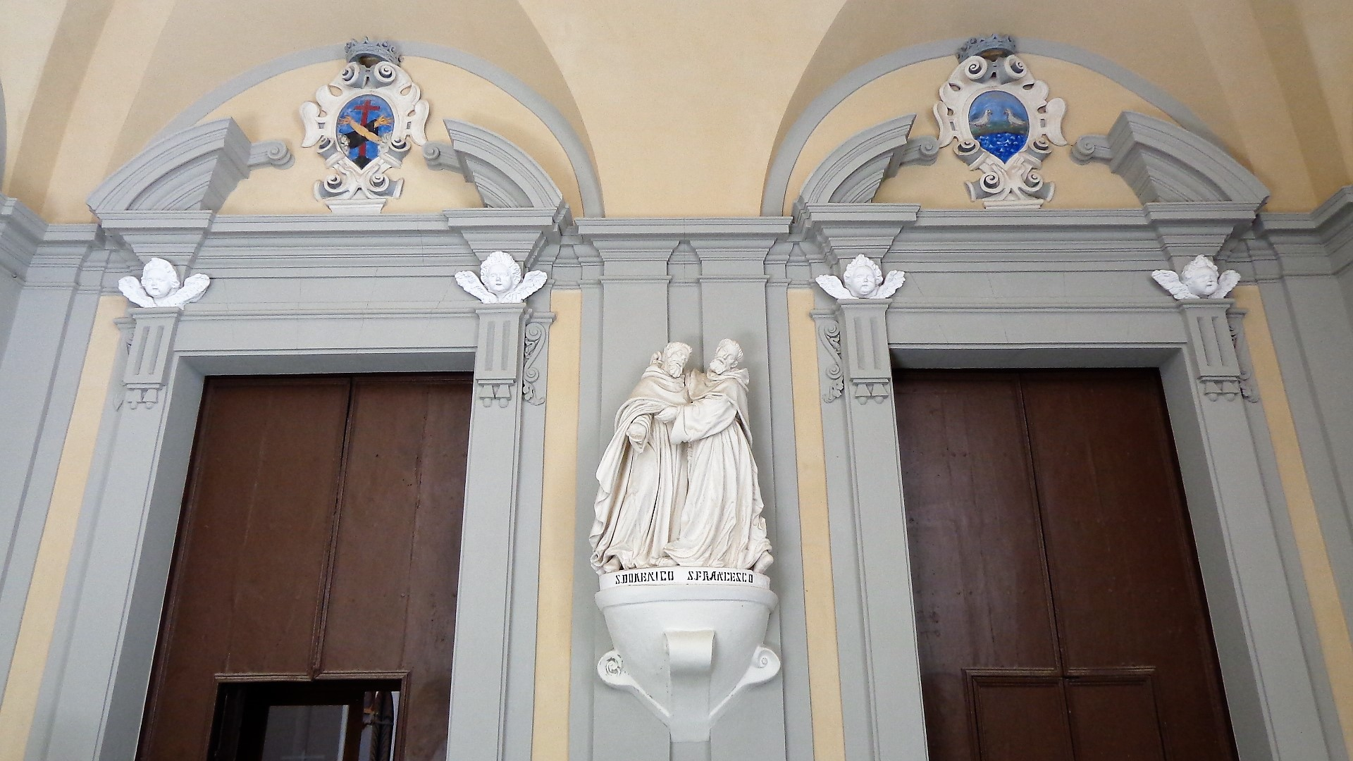 Scultura raffigurante San Domenico e San Francesco di Cristoforo Milanti fra i portali del prospetto.